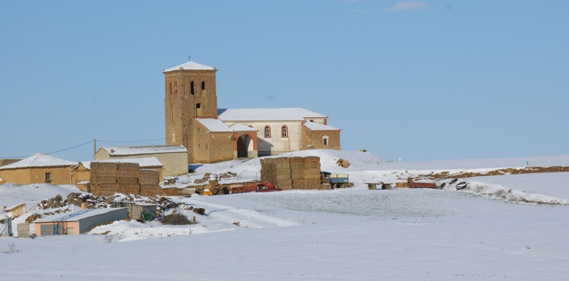 Vista con nieve